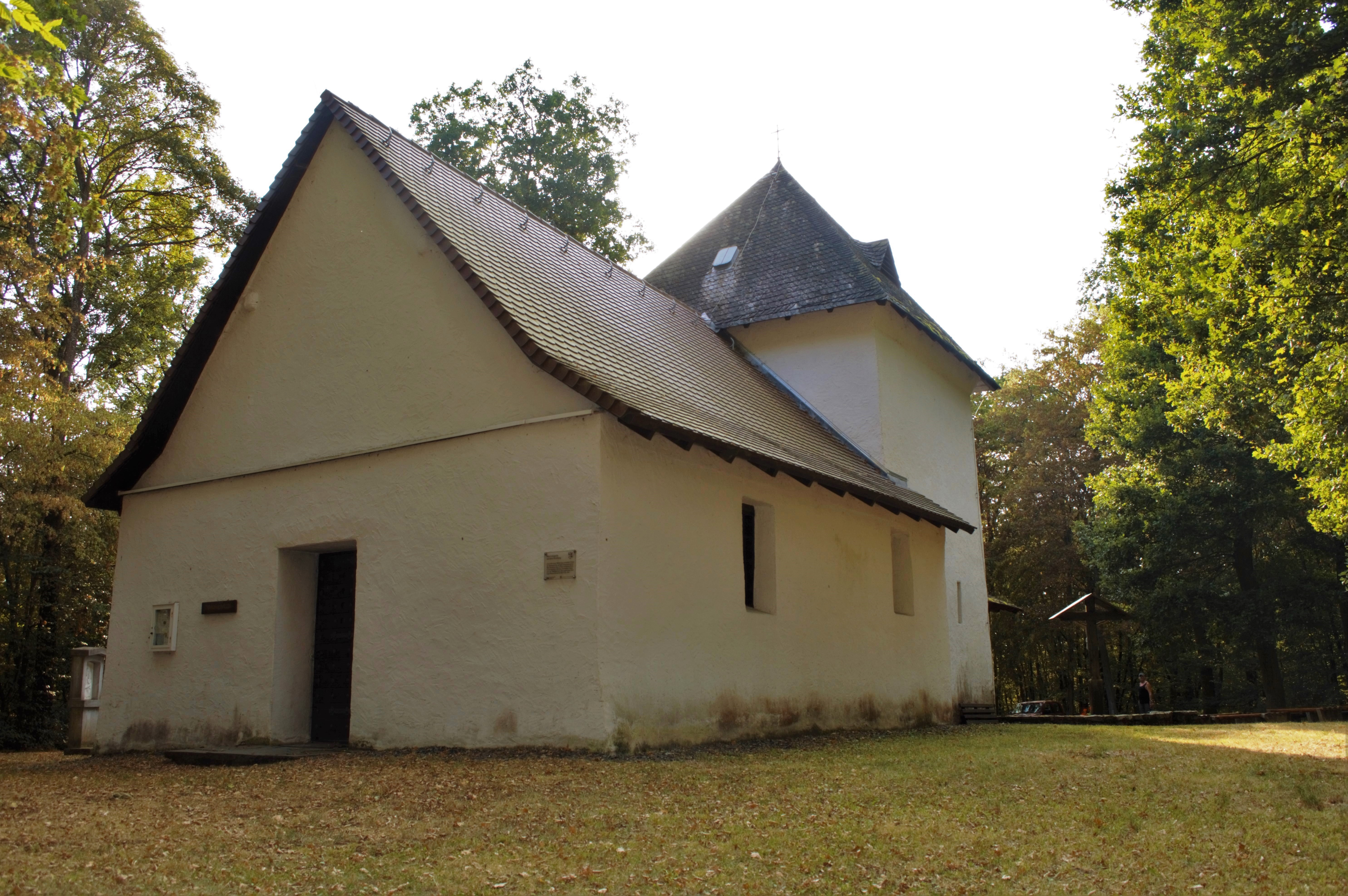 Innerhalb einer Wallanlage errichtete Filiale der Mutterkirche auf dem Johannisberg bei Bad Nauheim. Die im Kern mittelalterliche Kirche gehörte 1218 dem Deutschen Orden und war Wallfahrtsort. Die zugehörige Siedlung Oberholzburg fiel im 15. Jh. wüst